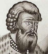 Великий князь Всеволод Большое Гнездо